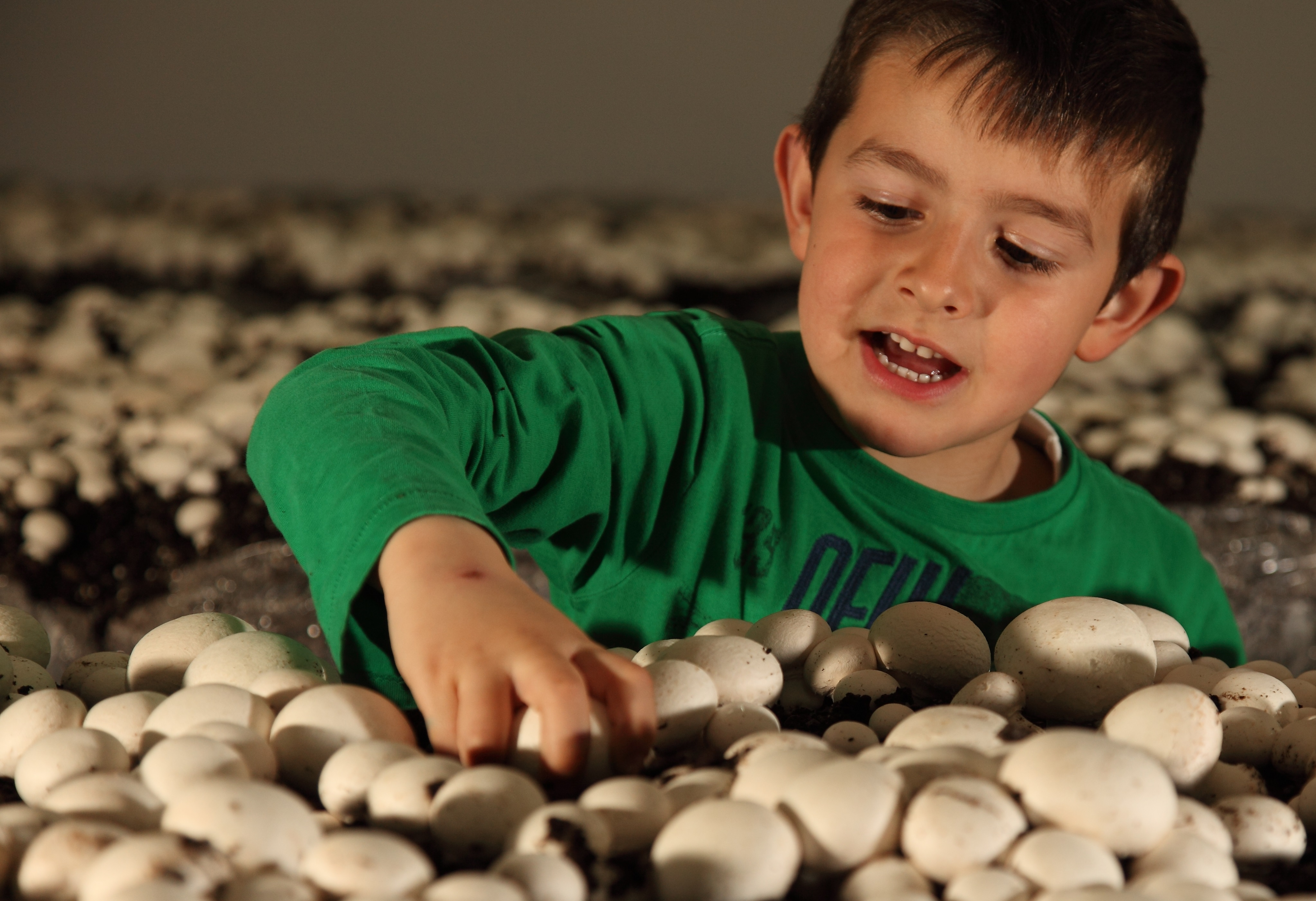 Cultivo de champiñón (Agaricus bisporus) en Pradejón, localidad líder en producción de hongos en España.